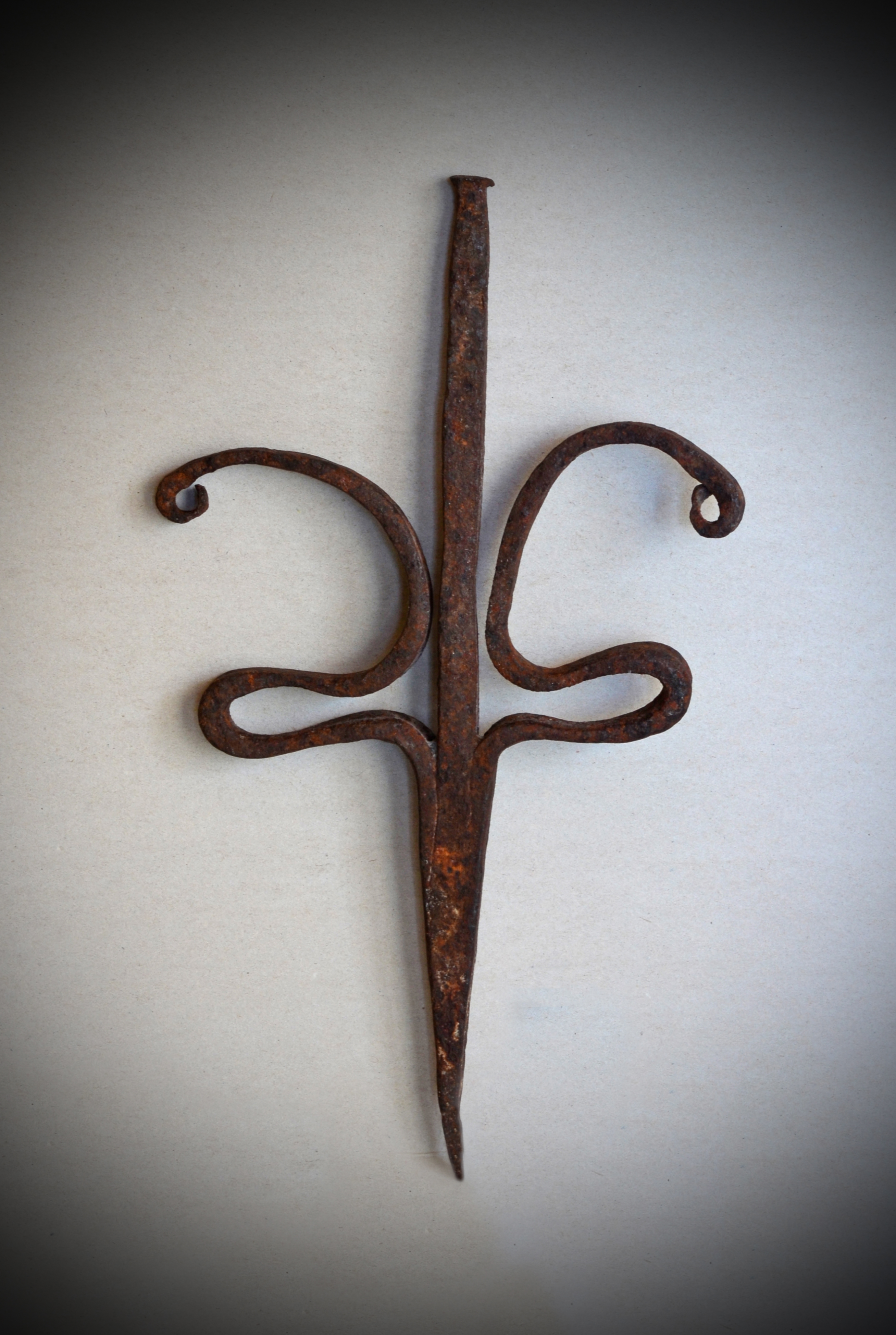 Светец.17-18 вв. Вологодская область.